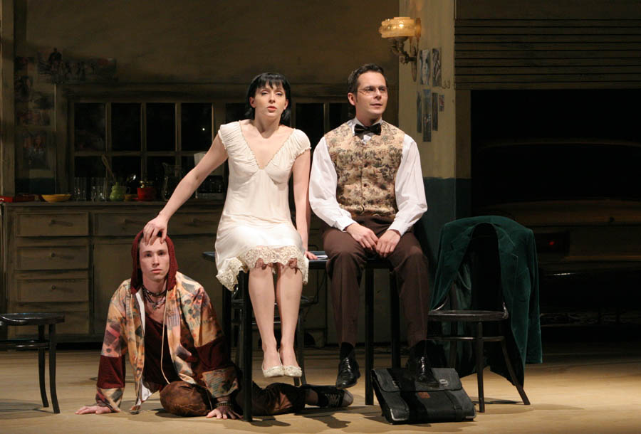 Сцена из спектакля Саратовского академического театра драмы «Сердечные тайны» по пьесе Бет Хенли. Актёры Сергей Захарин, Зоя Юдина и Андрей Седов